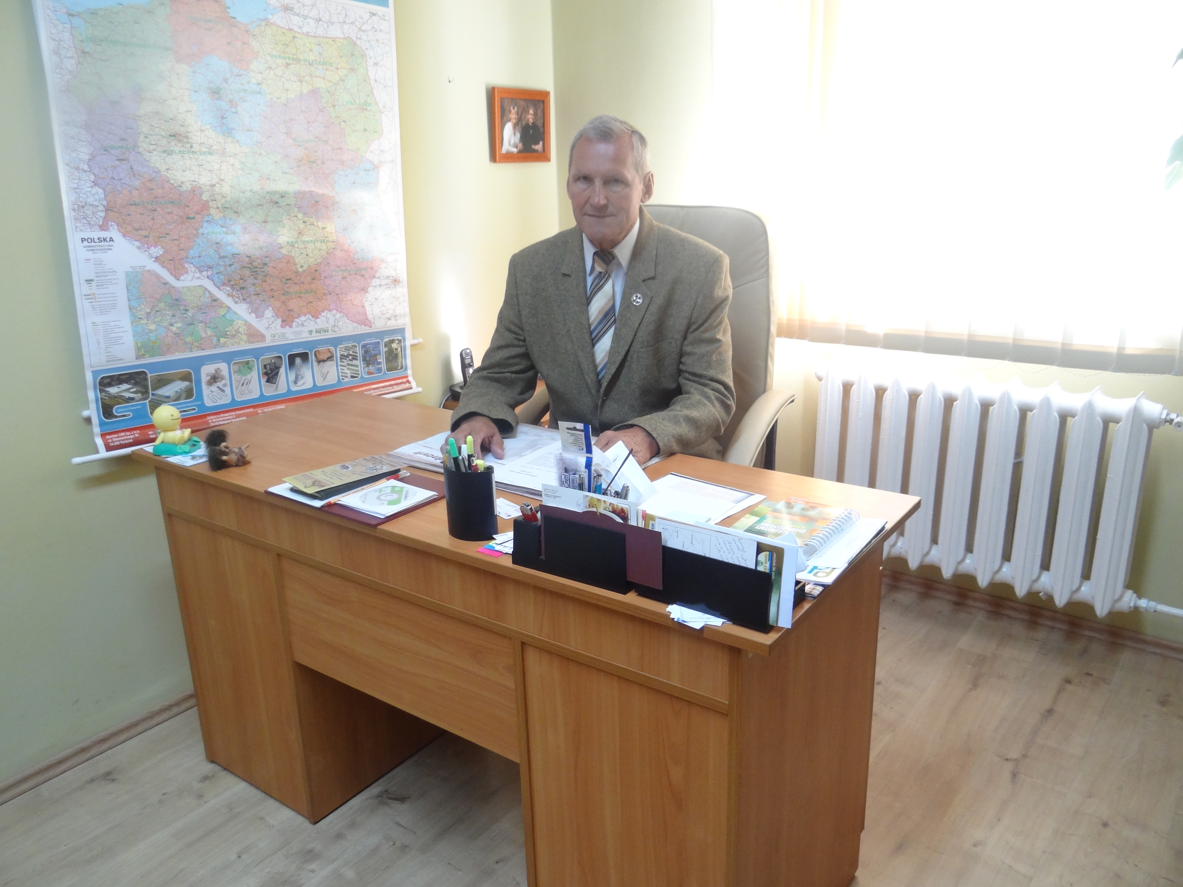 Stargard Szczeciński, 2013r. Dyrektor WSPL Leszek Haus